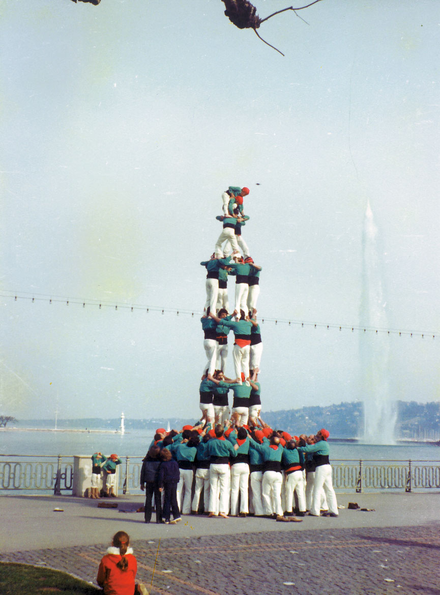 Viatge dels Castellers de Vilafranca a Ginebra (1978)